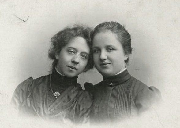 Елена Адриановна и Ольга Адриановна Праховы